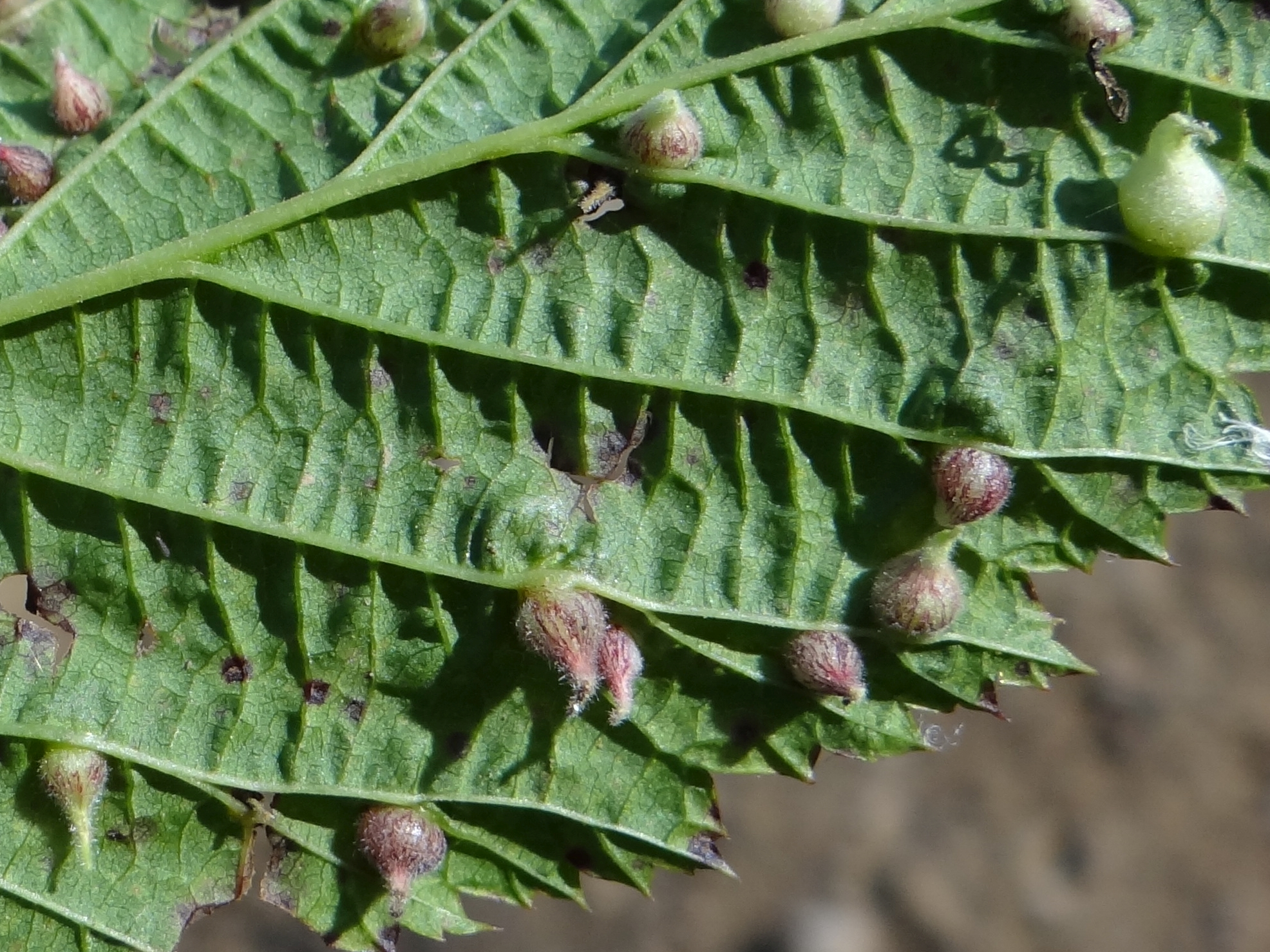 Dasineura ulmariae on leaf Filipendula ulmaria. Location: Poland, Szczawnica